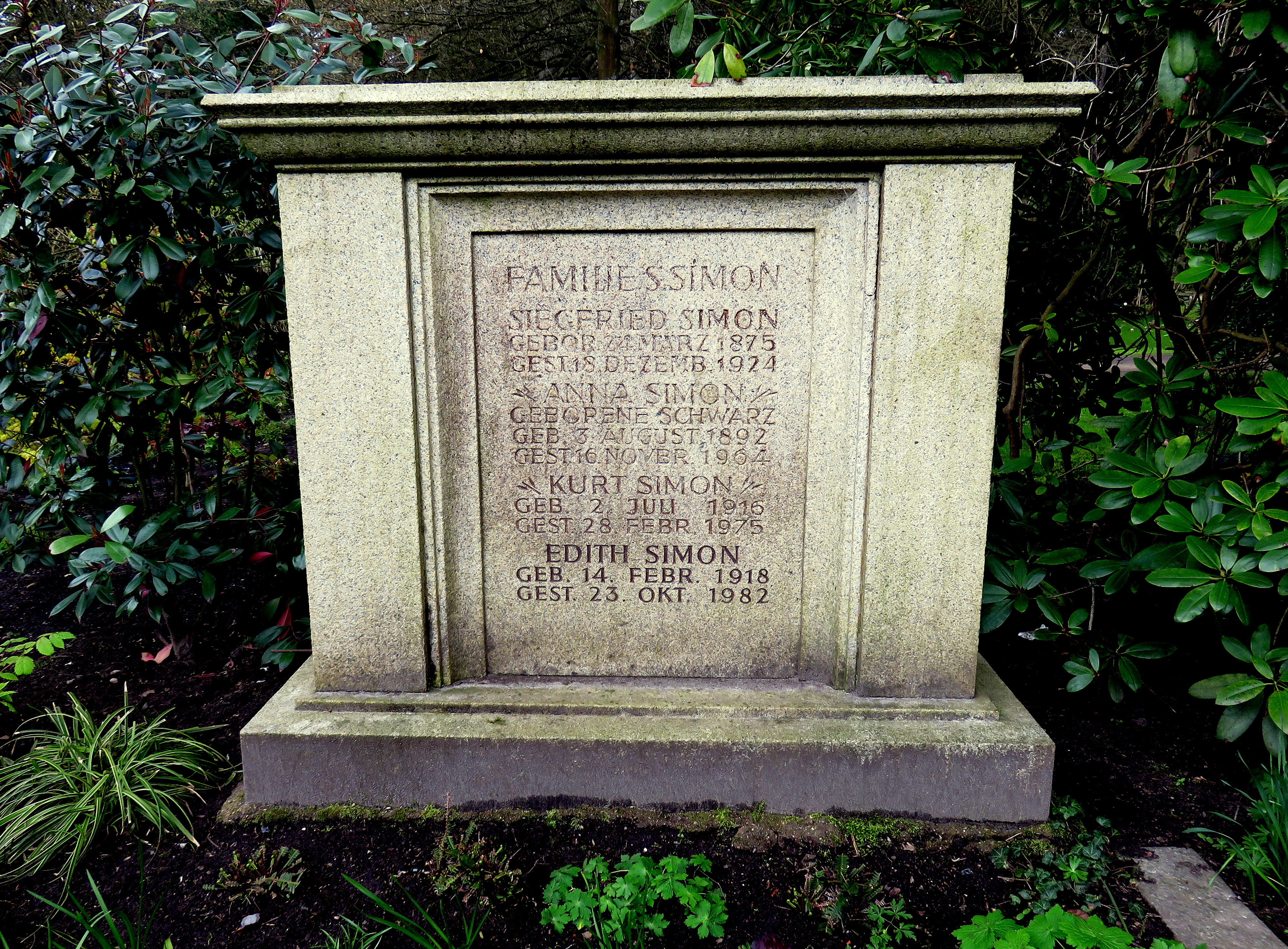 Historischer Grabstein der deutschen Theaterintendantin Anna Simon im Bereich des Gartens der Frauen auf dem Ohlsdorfer Friedhof in Hamburg-Ohlsdorf.